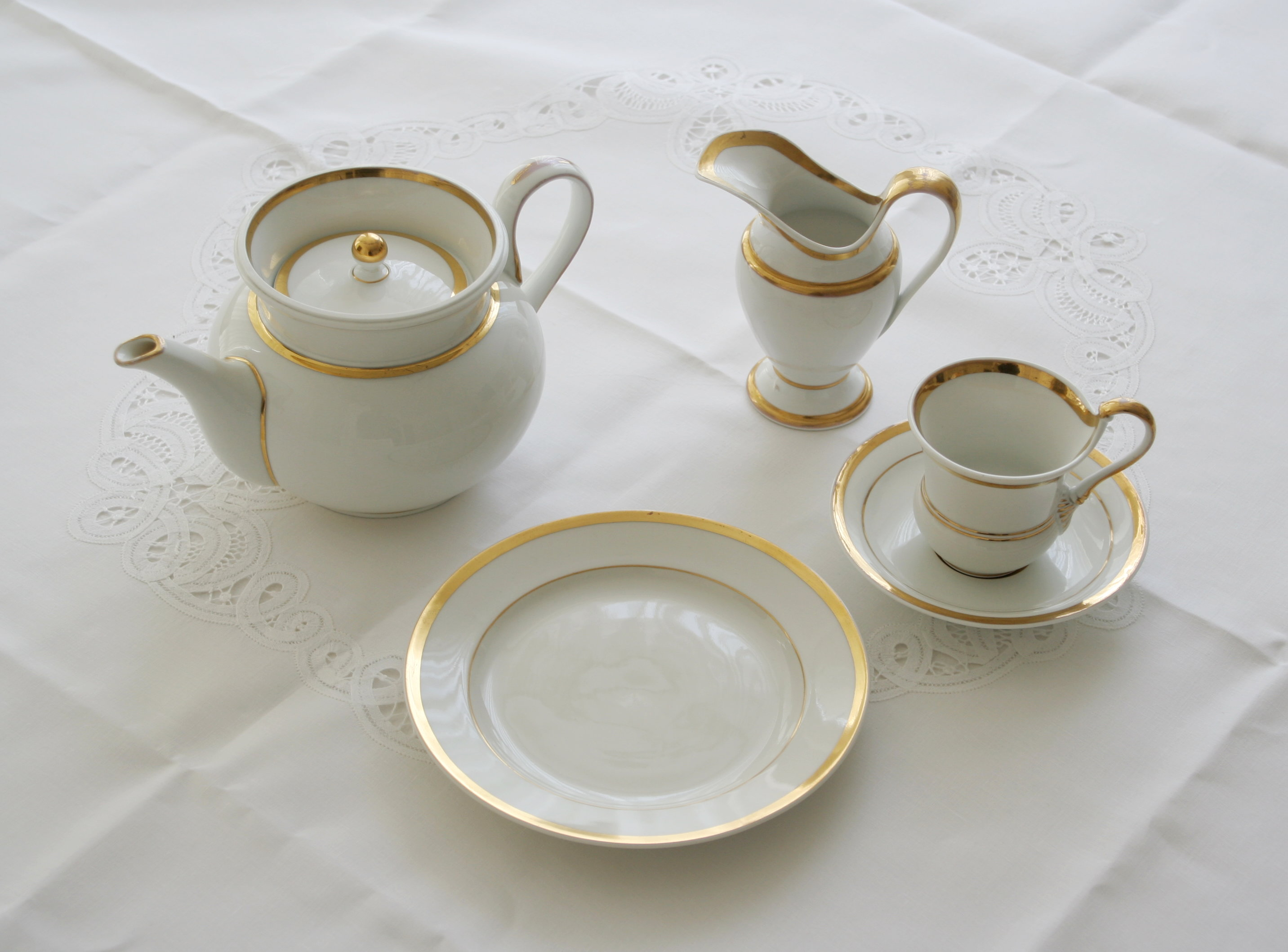 KPM "Königliche Porzellan Manufaktur" crockery from 1850